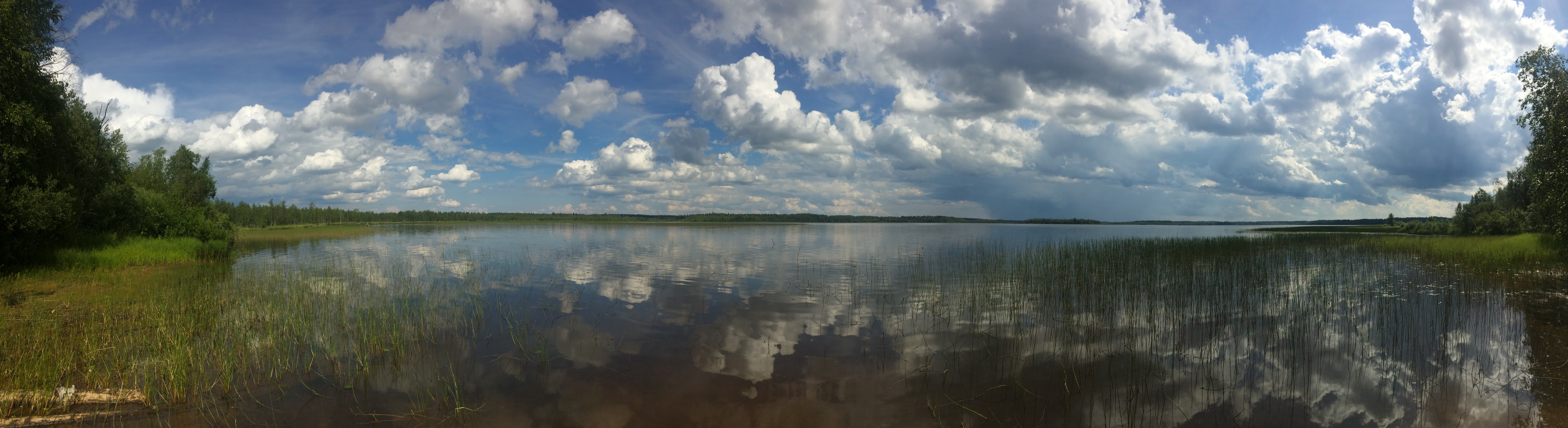 Верхнее Нёлгомозеро